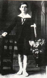 Fangio en 1920, Comunión.